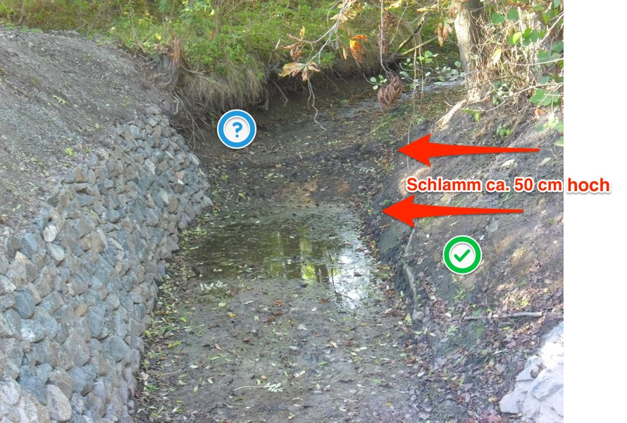 Schlammablagerungen im Leinakanal am Aquädukt